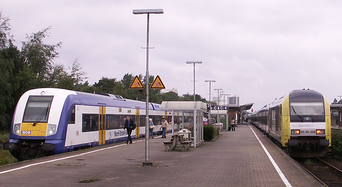 Zwei auf der Marschbahn in entgegengesetzter Richtung verkehrende Züge der Nord-Ostsee-Bahn am Bahnsteig der Gleise 4 und 5 beim Stopp in Husum